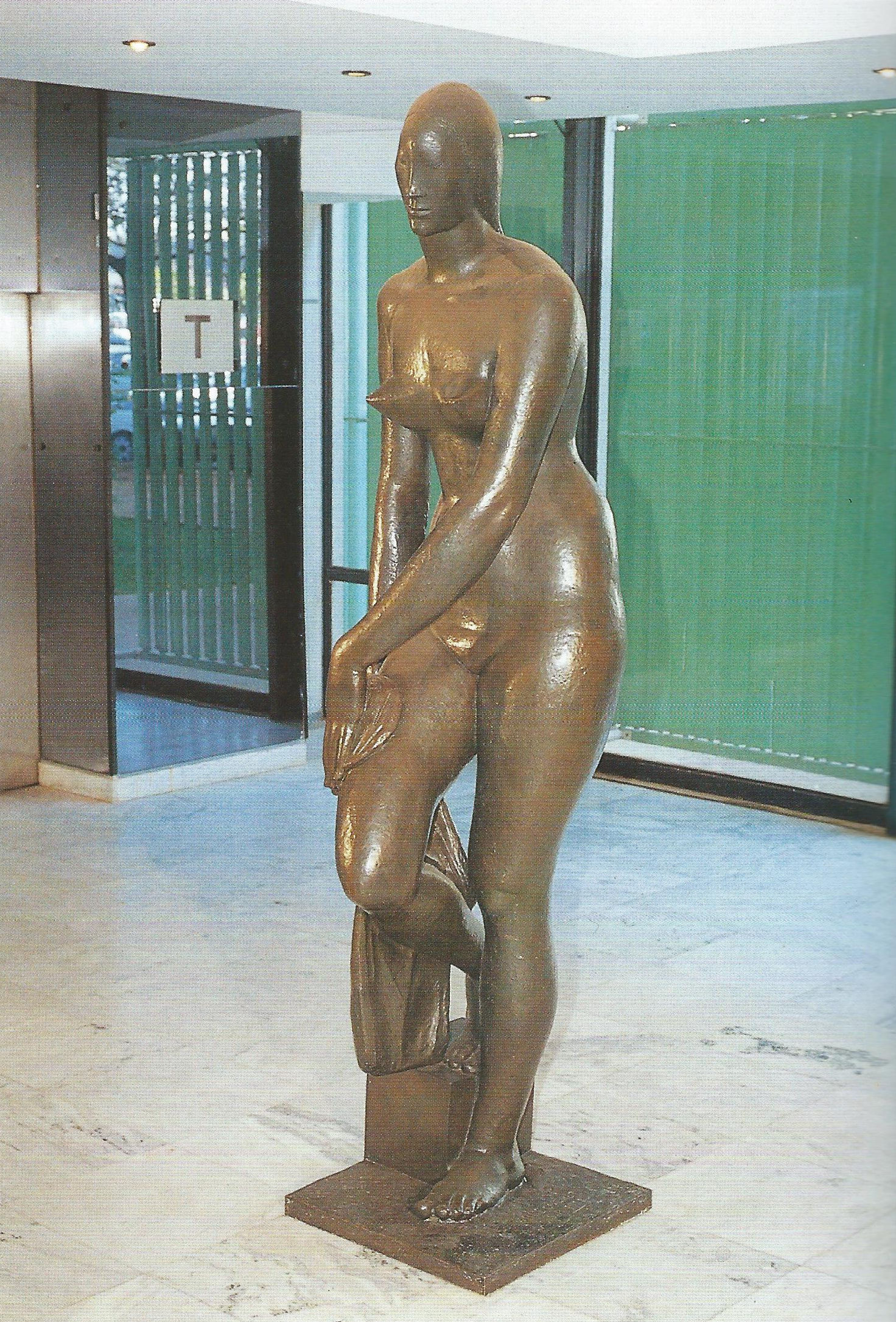 Figura feminina, escultura do artista plástico brasileiro Victor Brecheret, de 1951, exposta no Ministério da Educação, Rio de Janeiro, Brasil